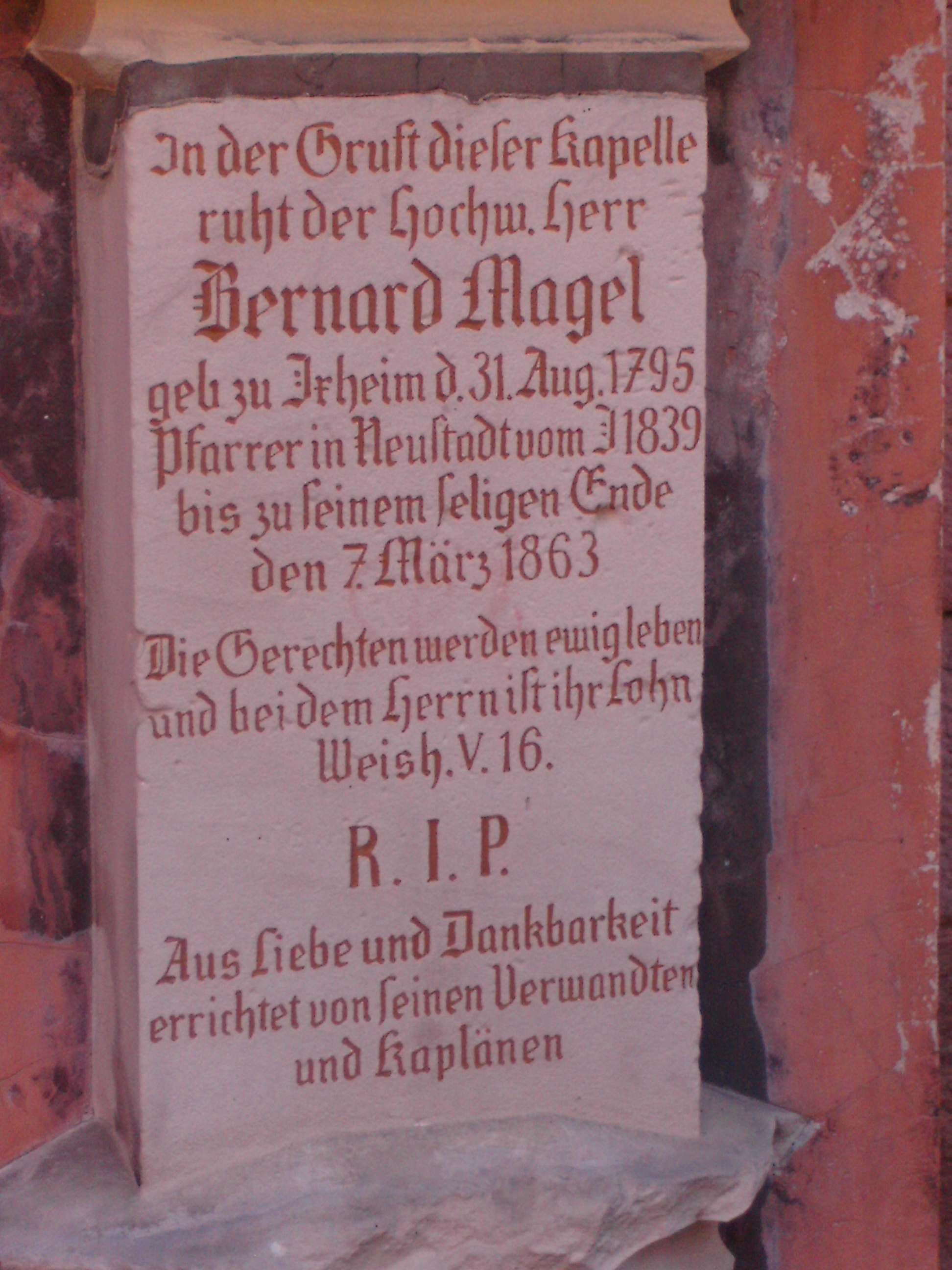 Grabinschrift Pfarrer Bernhard Magel, Marienkirche Neustadt an der Weinstraße